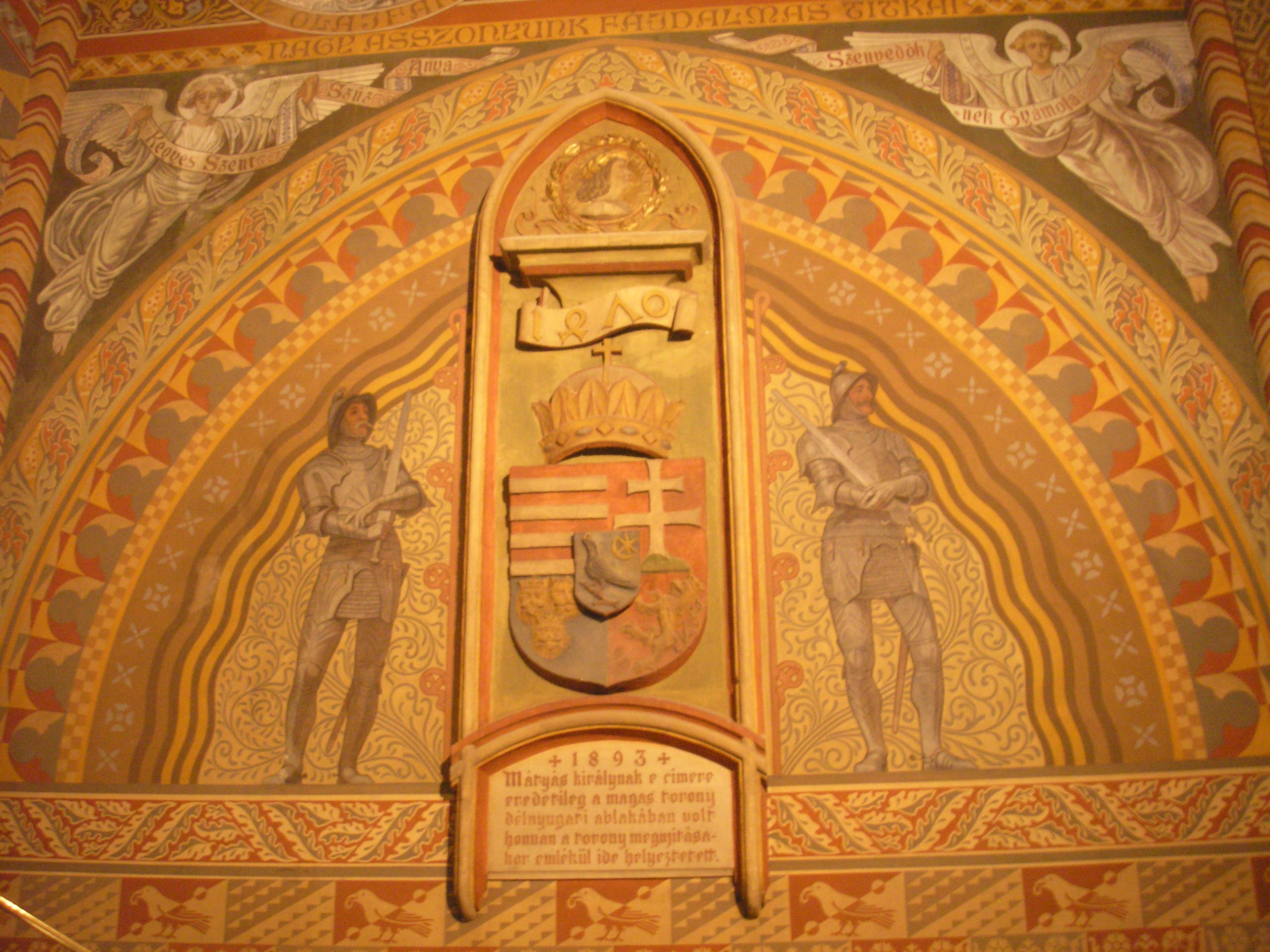 Das Rabenwappen